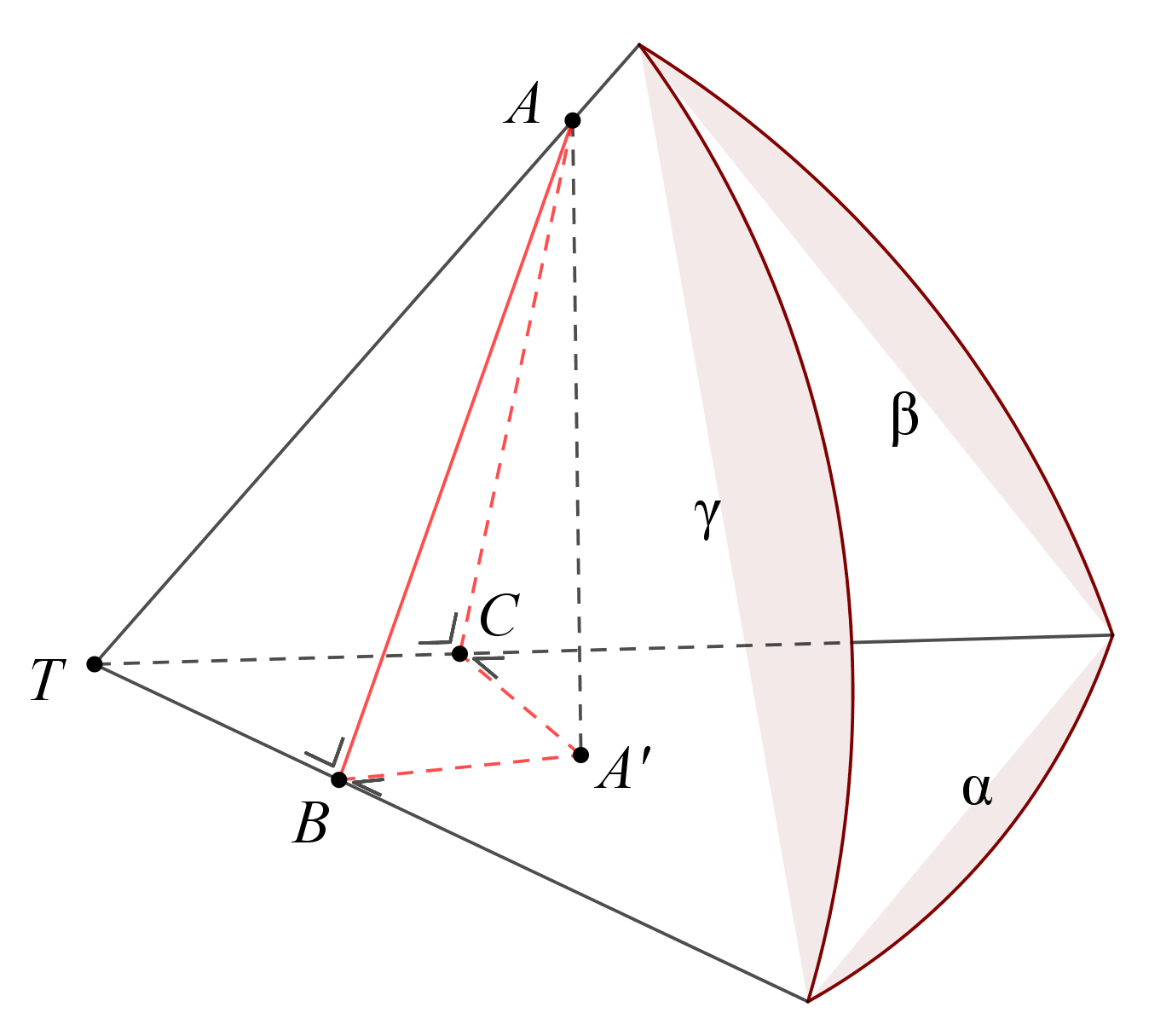 Drievlakshoek met (stand)hoeken